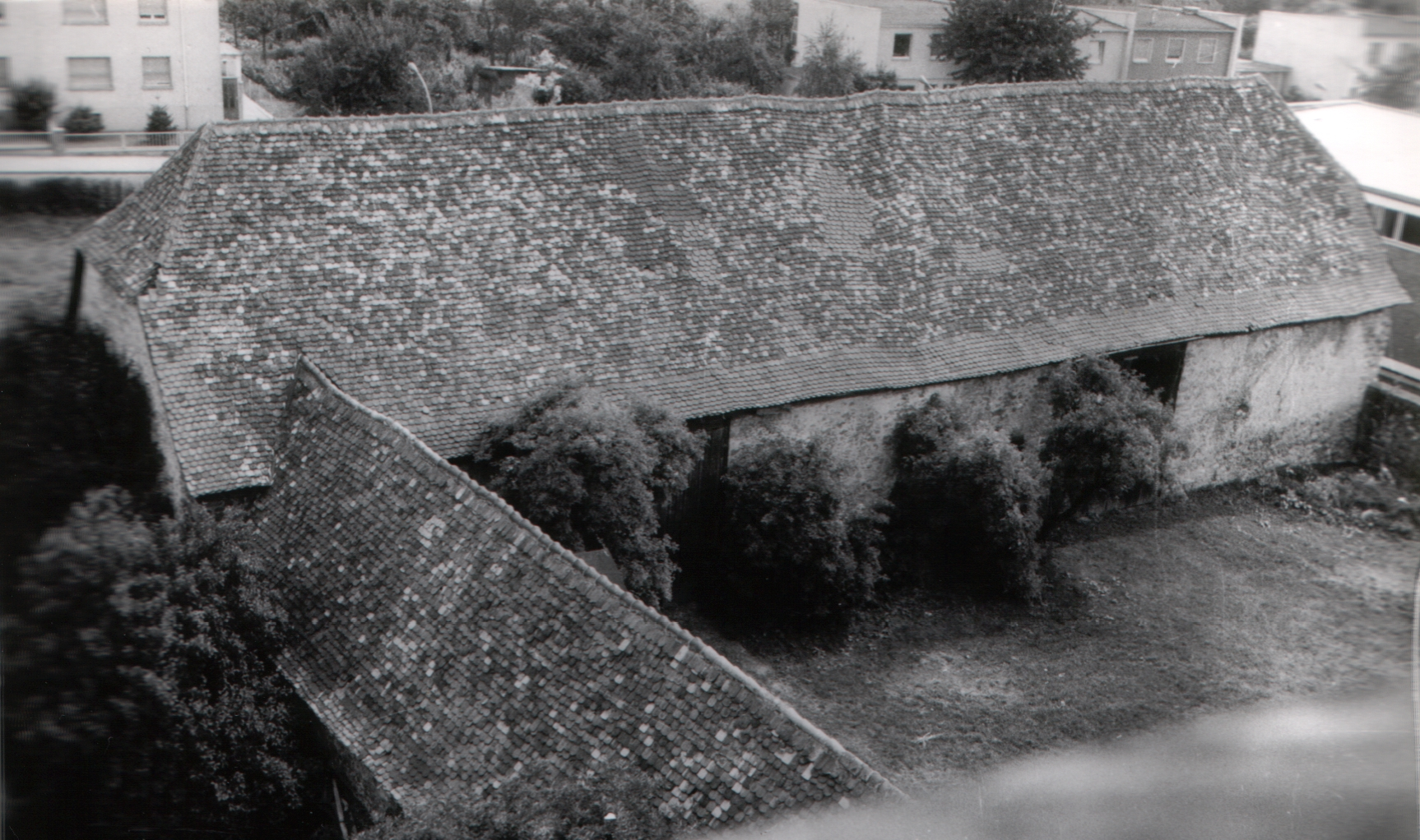 Scheune